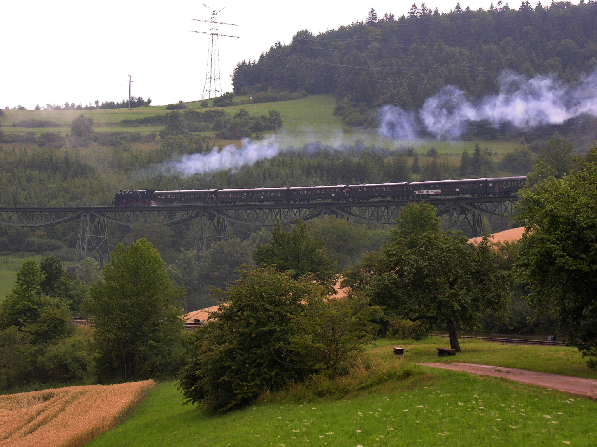 Germany, Baden-Württemberg, Sauschwänzlebahn, the museum railway between Blumberg and Weizen